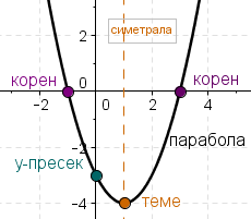 Квадратна функција